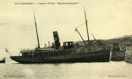 Le vapeur postal Ile d'Ouessan, construit en 1917, coula le 6 juin 1924 dans la baie de Lampaul tout près d'Ouessant. Il assurait le service des îles de Molène et Ouessant pour le compte de la Compagnie des Chemins de Fer Départementaux du Finistère.